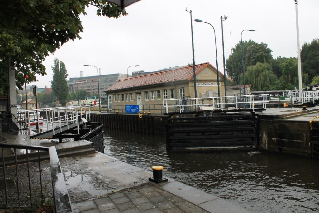 Schleusentor